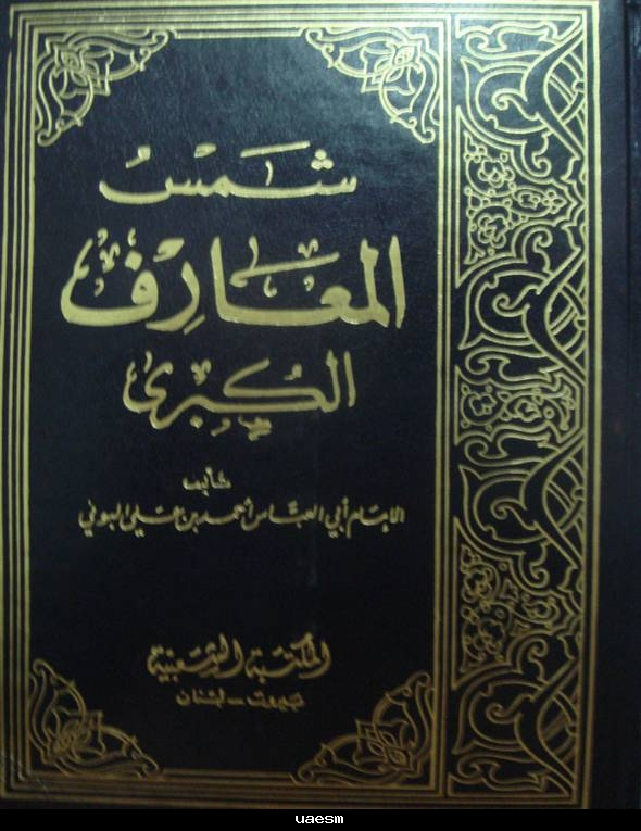 صورة غلاف كتاب شمس المعارف أحد كتب تعليم السحر والشعوذة والدجل